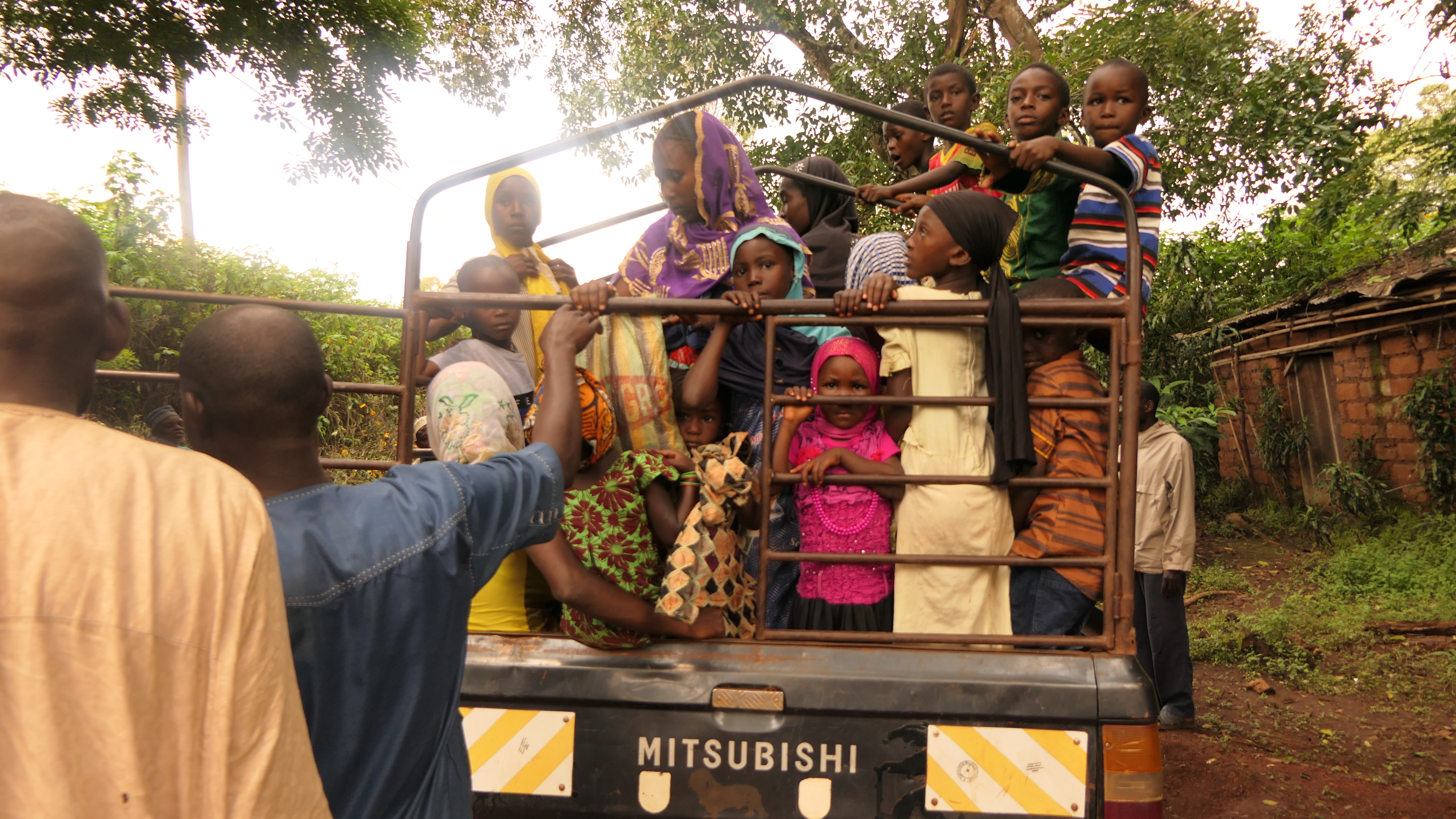 Moyen de transport des déplacés du nord-ouest installés aux rives du fleuve Noun dans le village bamedjin This is an image with the theme "Africa on the Move or Transport" from: Cameroon